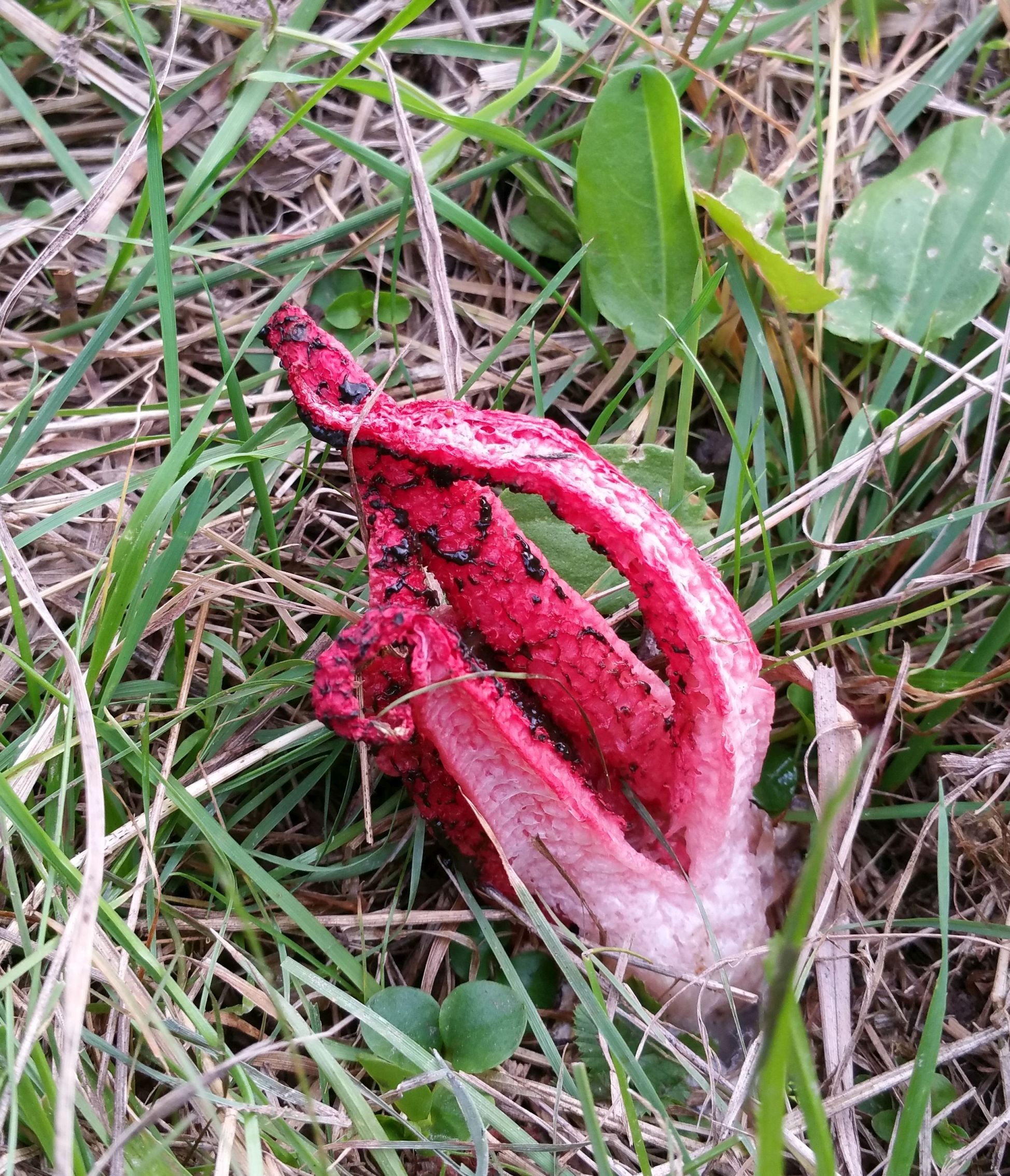 Tintenfischpilz in einer Feuchtwiese an der Moosalb bei Ettlingen, Deutschland